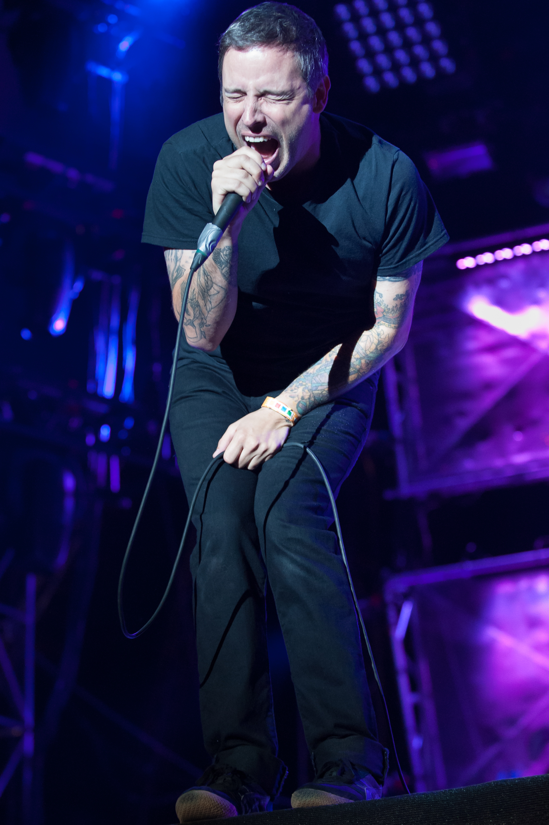 Boysetsfire beim Musikfestival Rocco del Schlacko August, 2012.